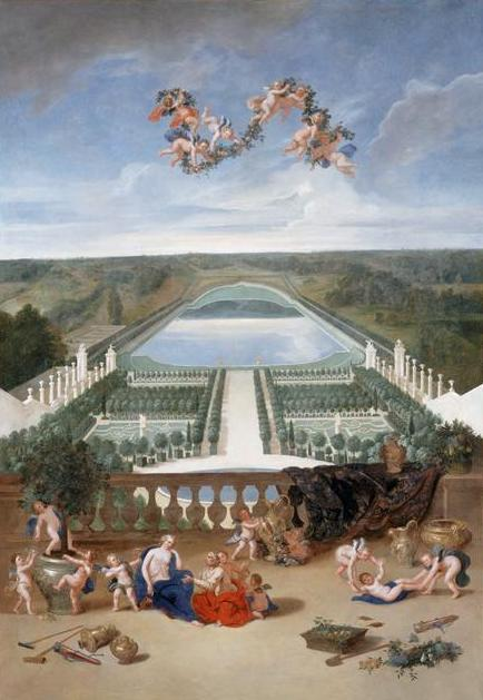 Vue de l'Orangerie et de la Pièce d'Eau des Suisses